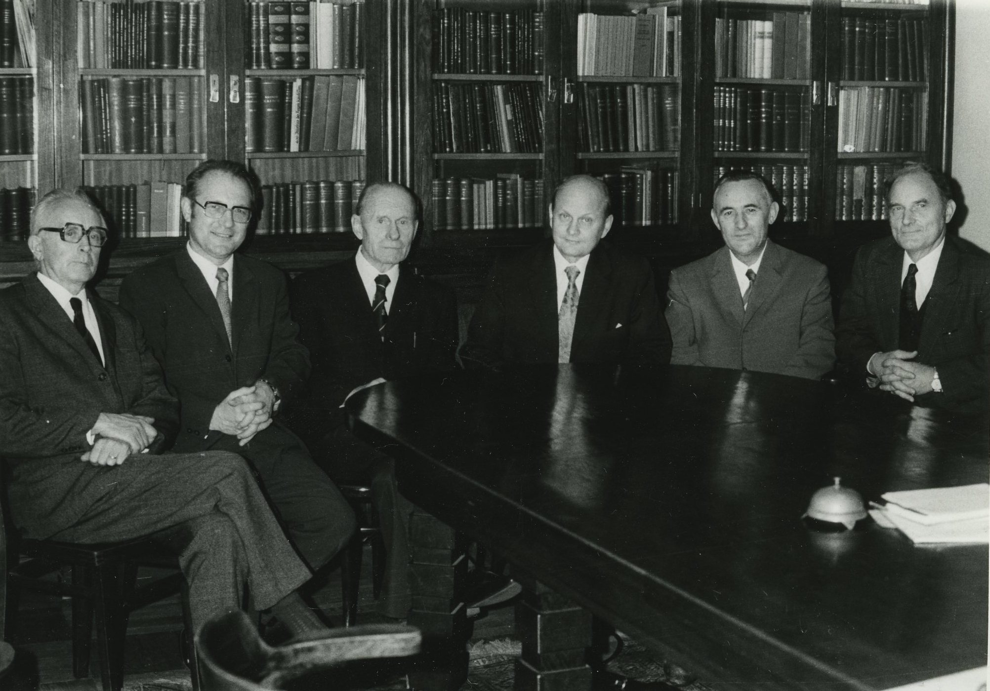 Synodní rada 1977 zvolená 20. synodem 20.-22.10.1977. Zleva: Vladimír Chadim, Dr. Jaro Křivohlavý, náměstek syn. kurátora (zůstal ve funkci), JUDr. František Škarvan, synodní kurátor (zůstal), syn. senior Miloslav Hájek, Josef Hlaváč, náměstek syn. seniora, Jan Pokorný